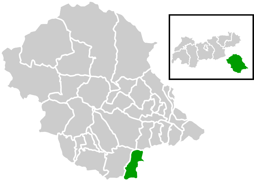 Lage der Gemeinde innerhalb des Bezirks Lienz